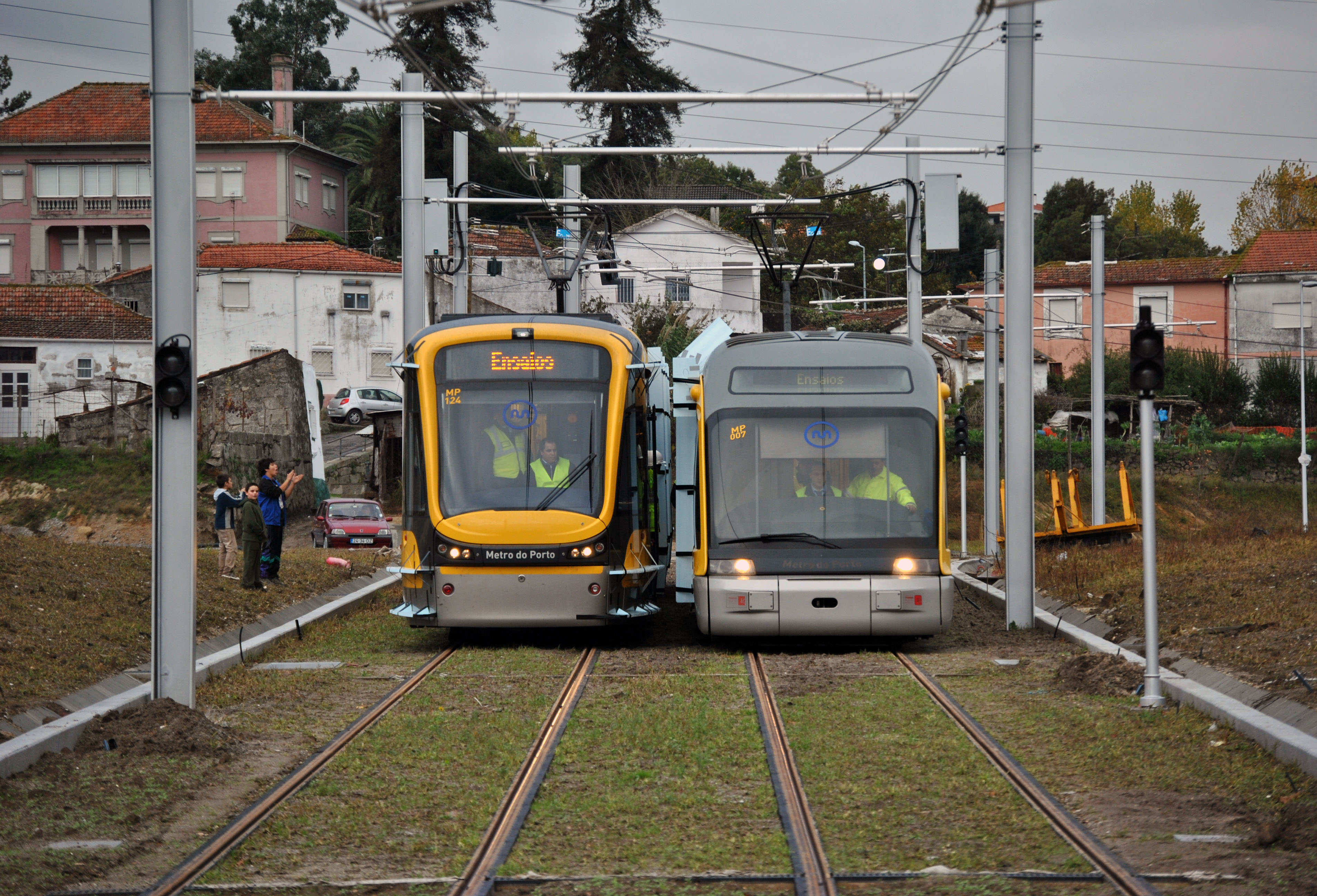 Testes de gabarito a ser efectuados até ao final de Dezembro, para a 1 de Janeiro 2011 ser inaugurada a nova linha do Metro do Porto até Fânzeres.